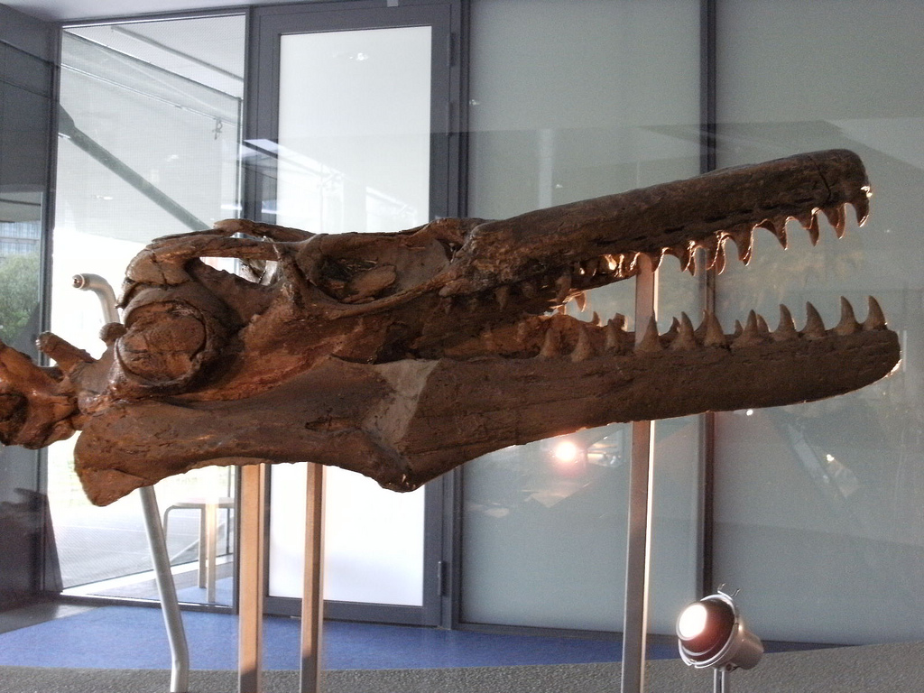 Maashagedis (complete skelet) Mosasaurus